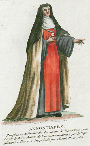 Collection de costumes de tous les ordres monastiques, supprimés à differentes époques, dans la ci-devant Belgique, Bruxelles, Philippe Joseph Maillart et sœur, 1811